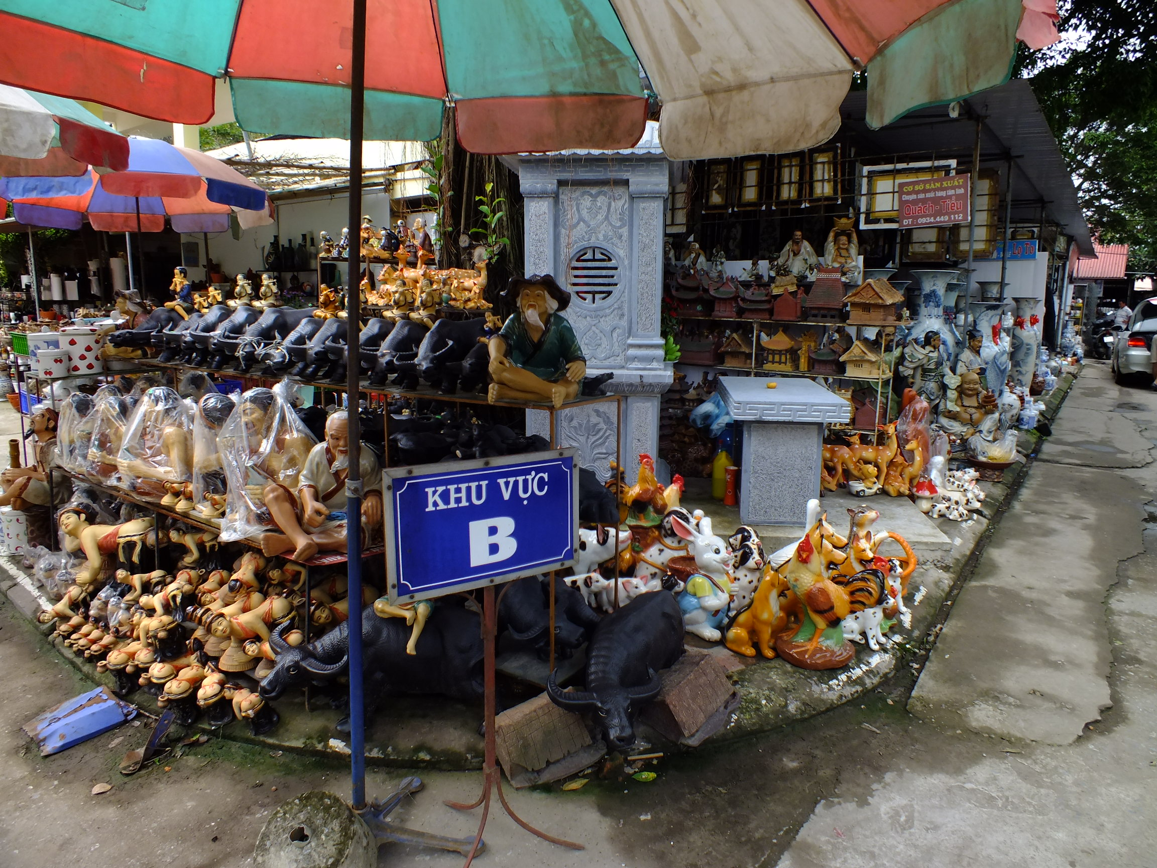 Xã Bát Tràng、 鉢塲社 バチャン村